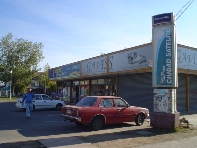 Centros Comerciales